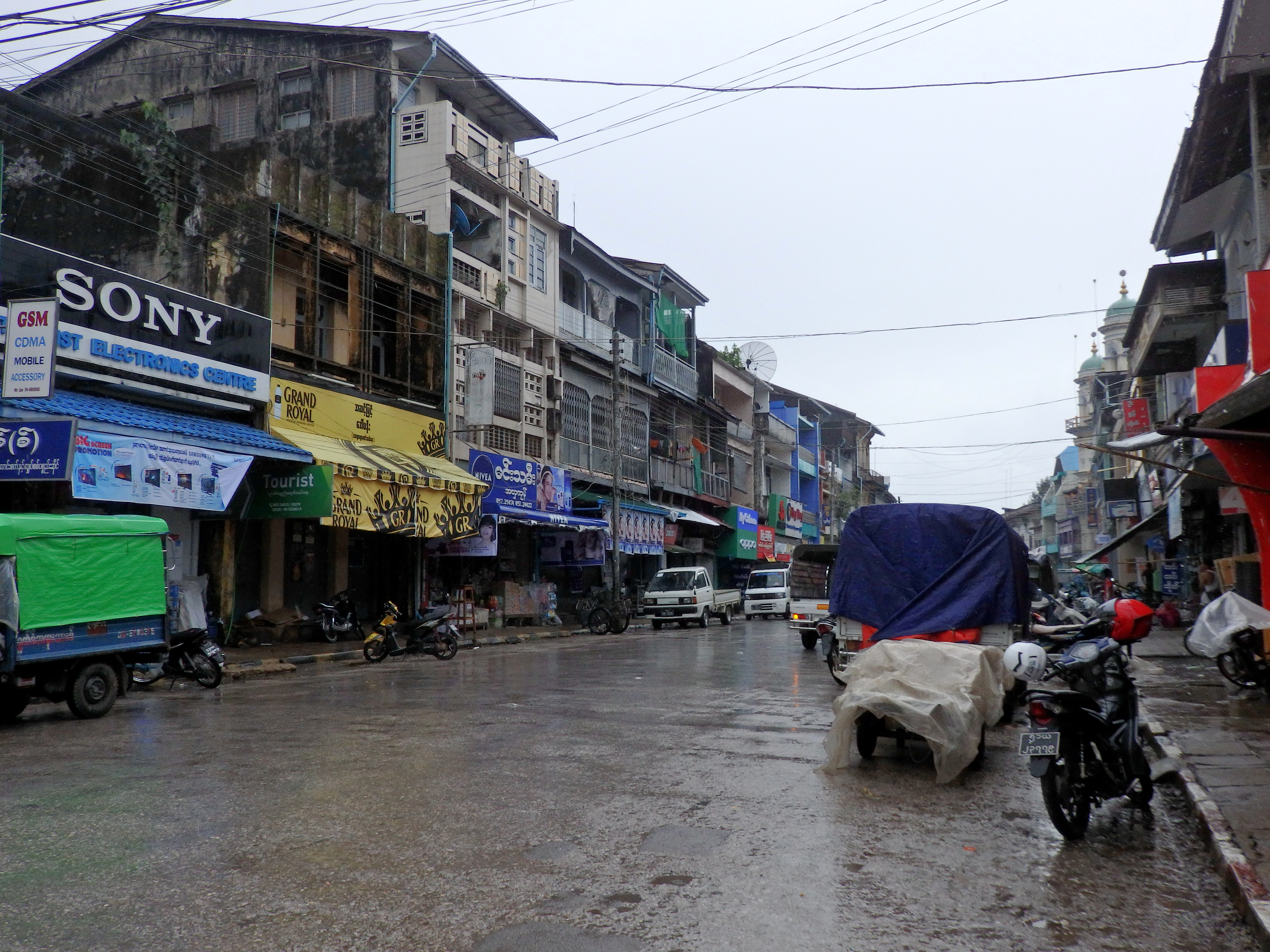 Mawlamyine MMR011001701, Myanmar (Burma)